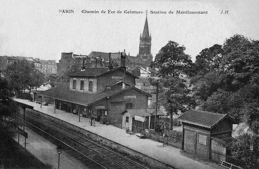 La gare de Ménilmontant et le clocher de l'église-Notre-Dame-de-la-Croix, vers 1900.